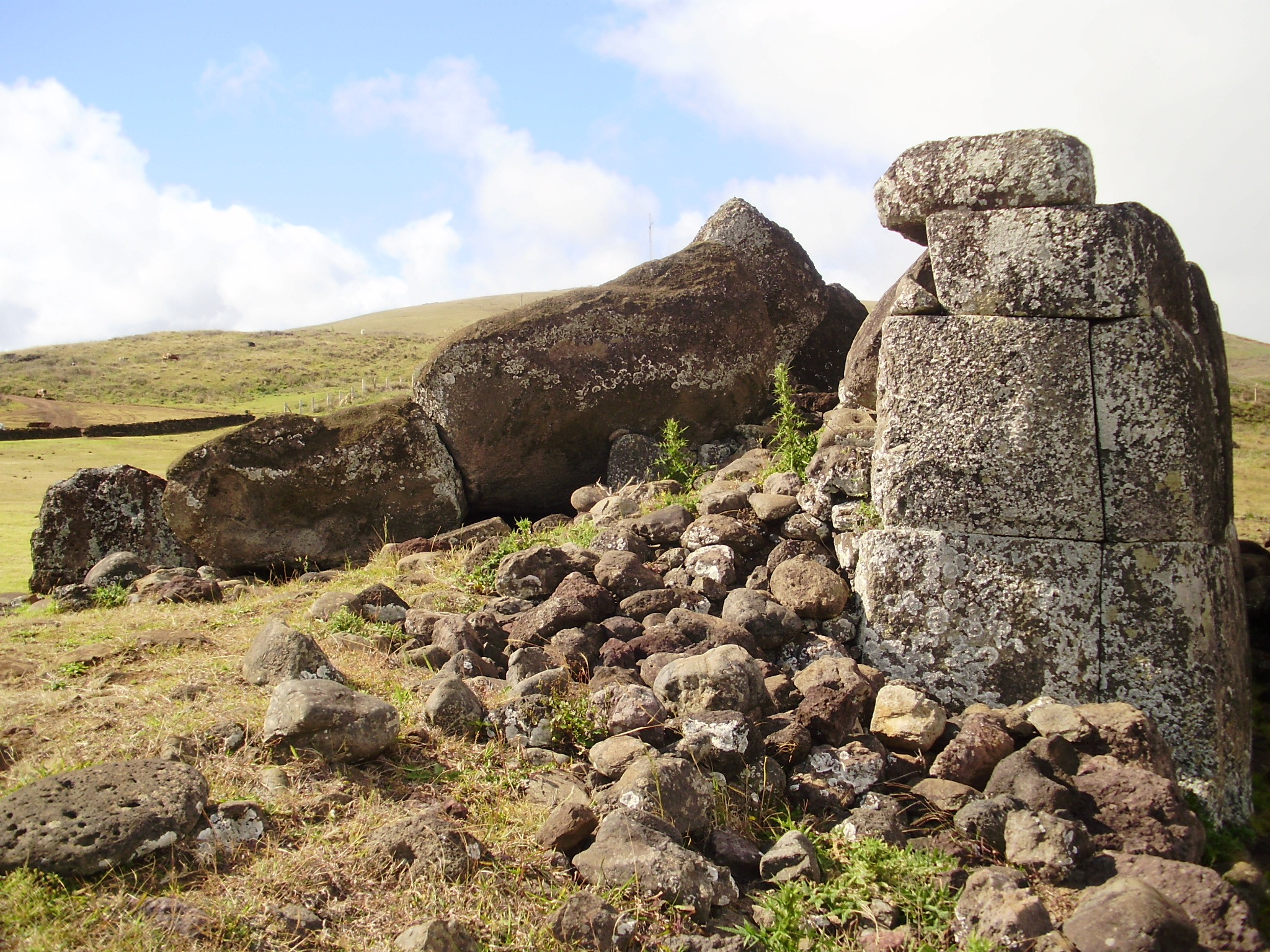 Ahu Vinapu, en Isla de Pascua, Chile.